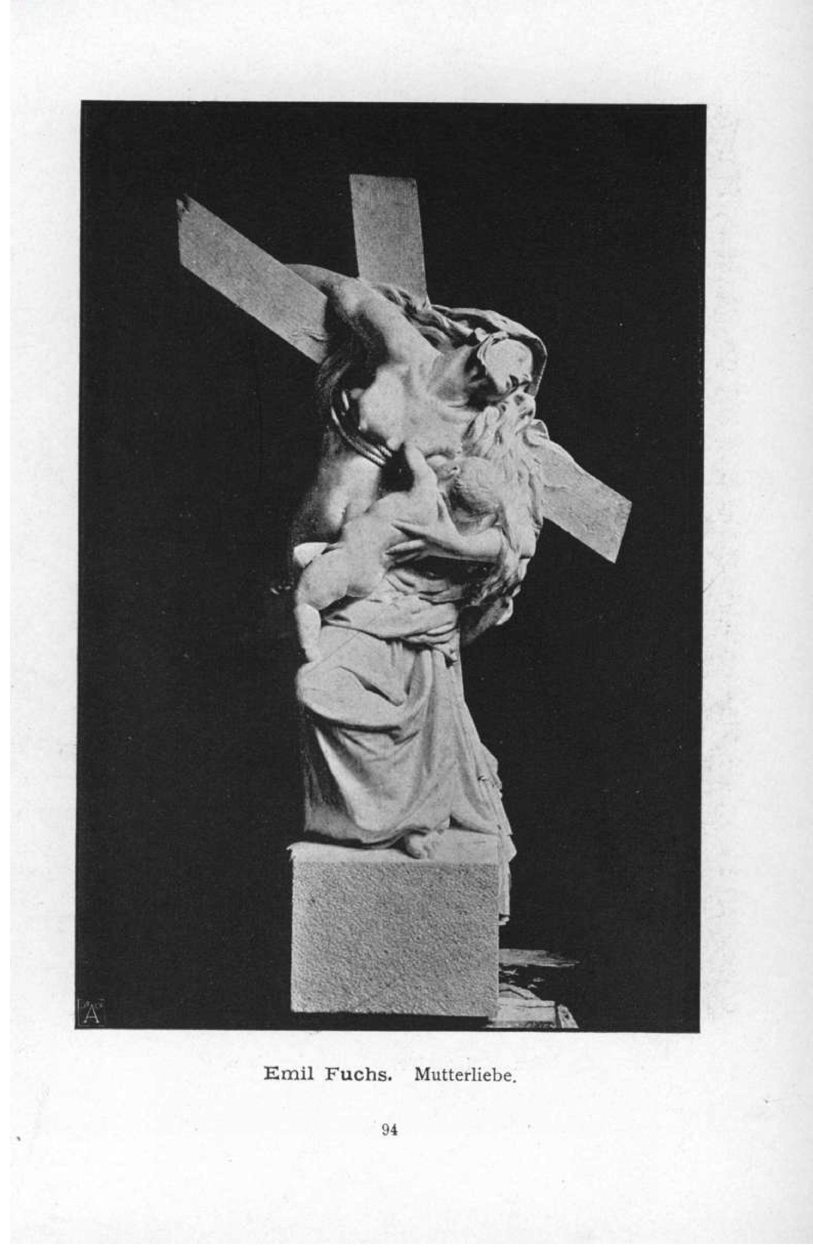 Mutterliebe